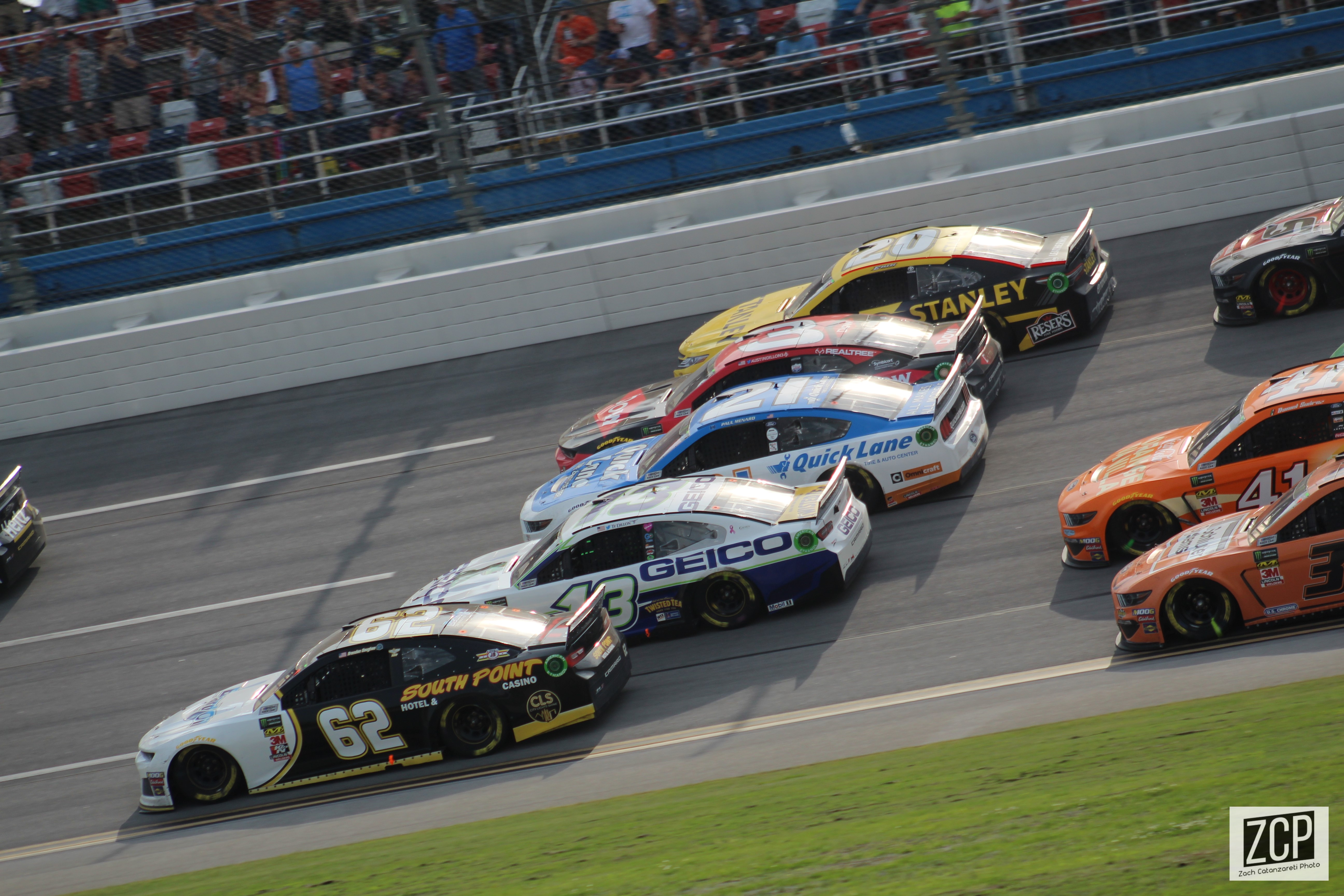 2019 GEICO 500